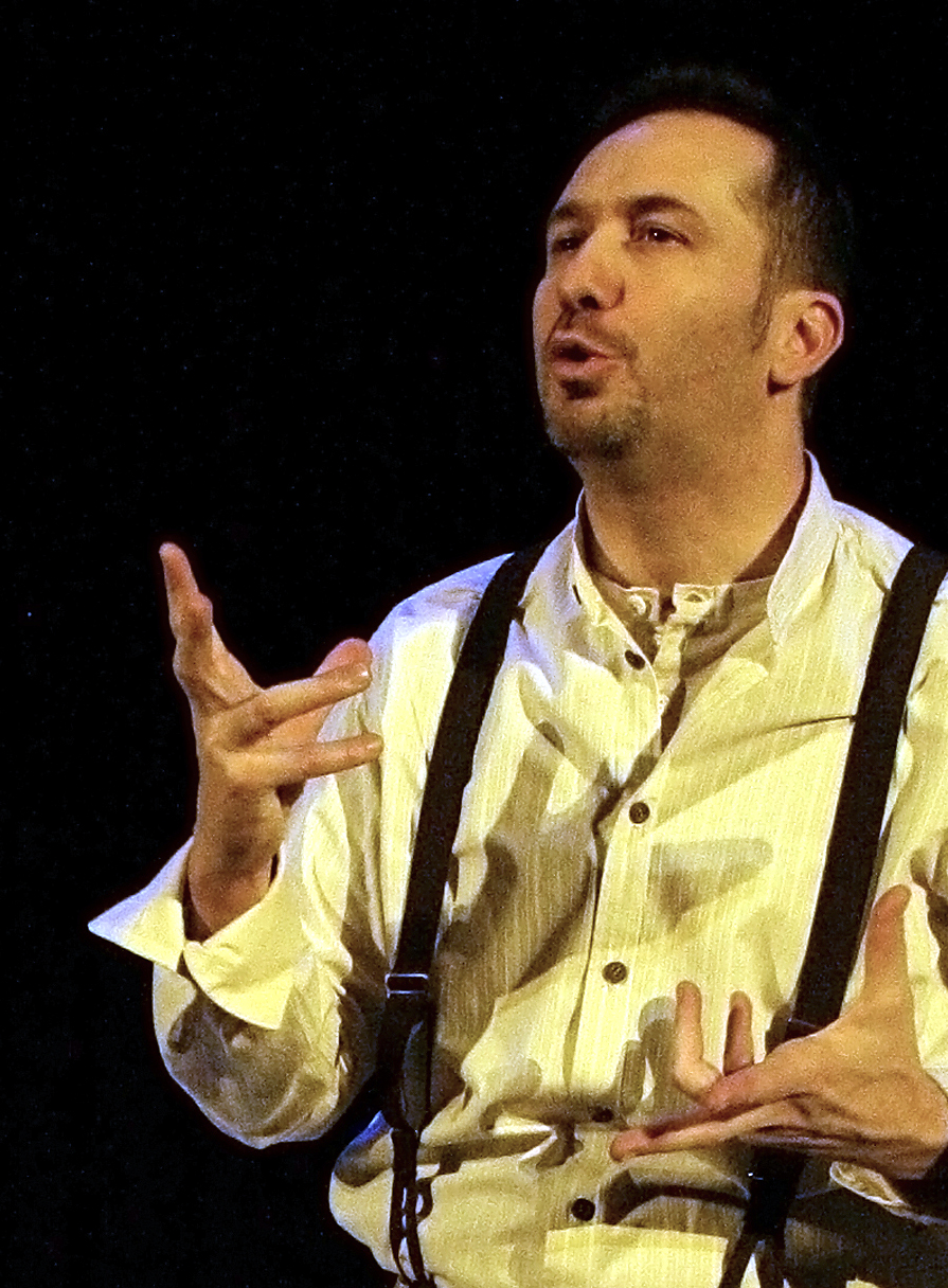 L'attore Davide Colavini